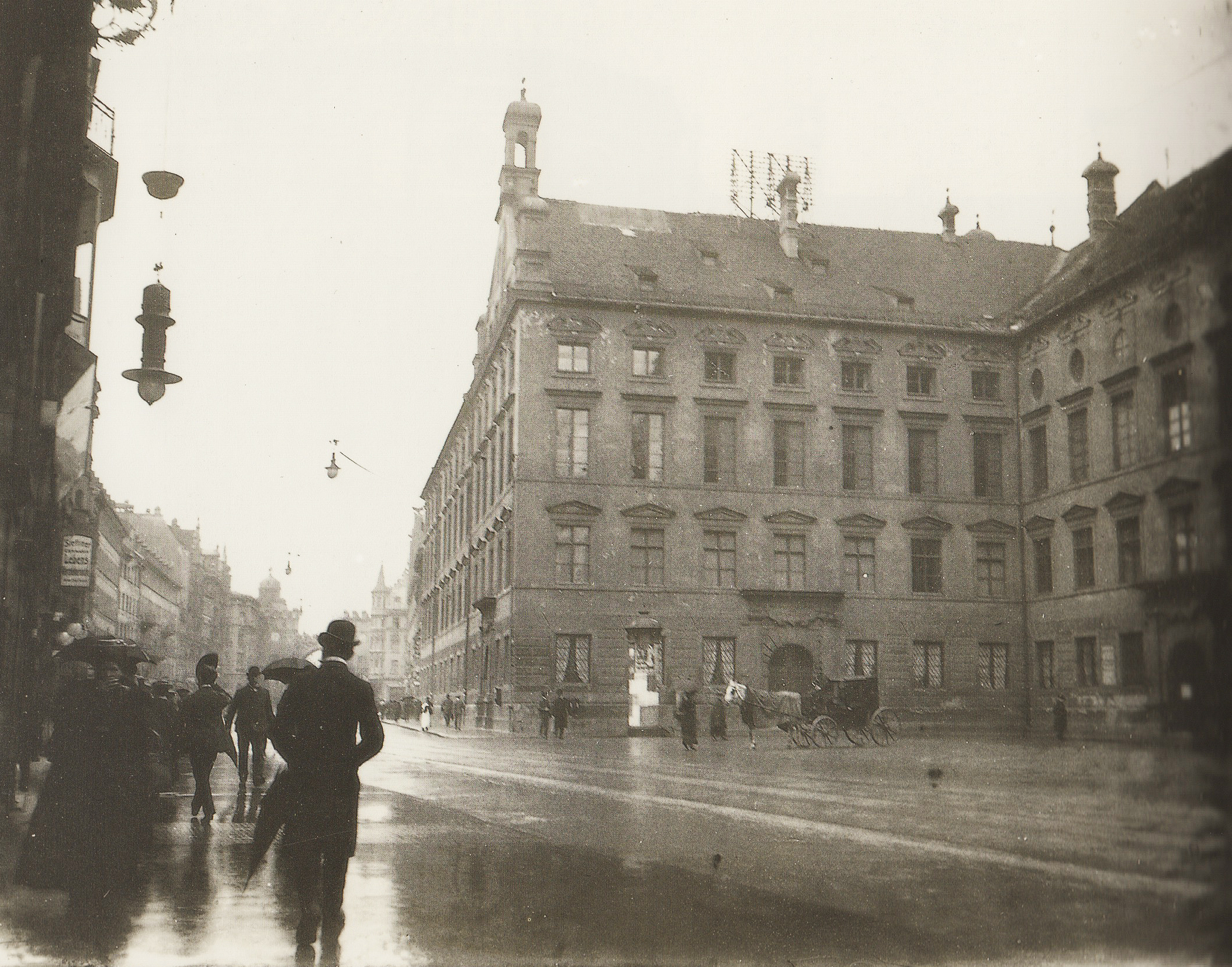 Die Münchner Neuhauser Straße, Höhe St.-Michaels-Kirche, rechts die Alte Akademie (1906)